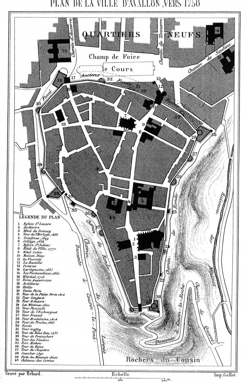 Plan de la ville d'Avallon vers 1750 (Avallon, Yonne, Bourgogne-Franche-Comté, France).